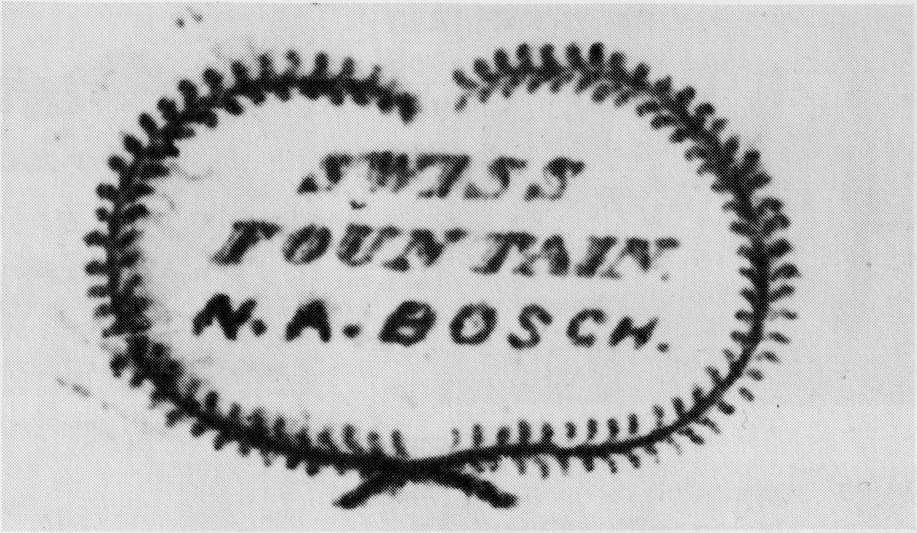 Merk N.A. Bosch, Maastricht.